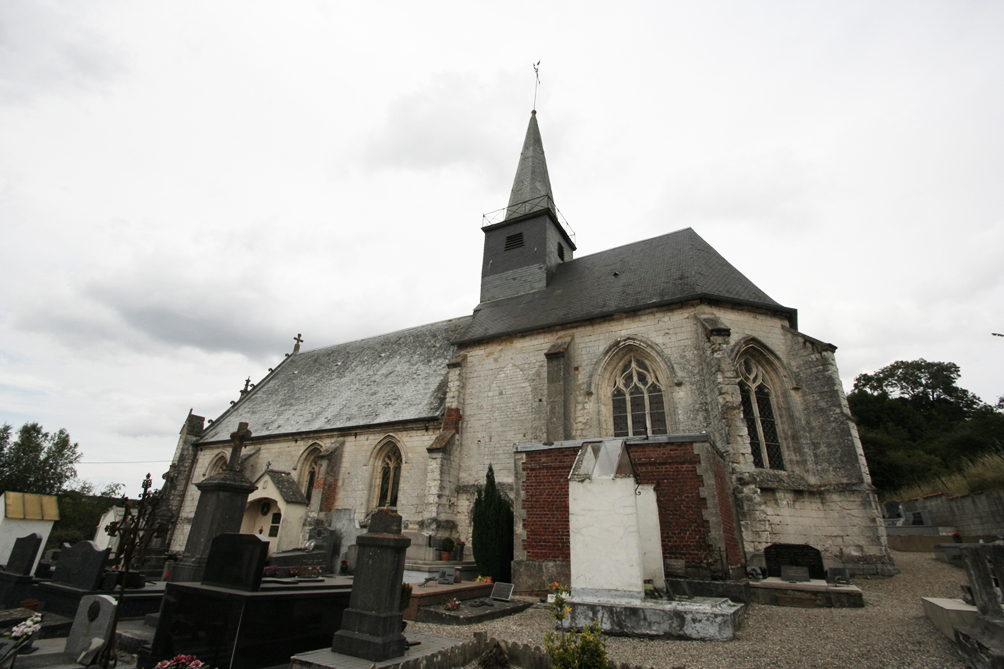 Écuires église .